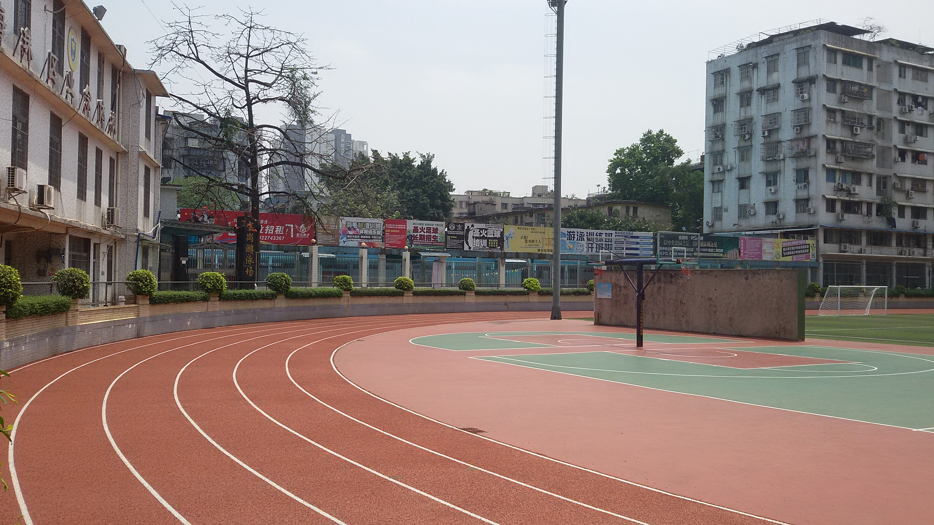 粵語: 寶崗泳場